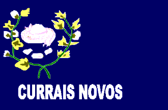 Bandeira do município de Currais Novos no estado do Rio Grande do Norte, Brasil.